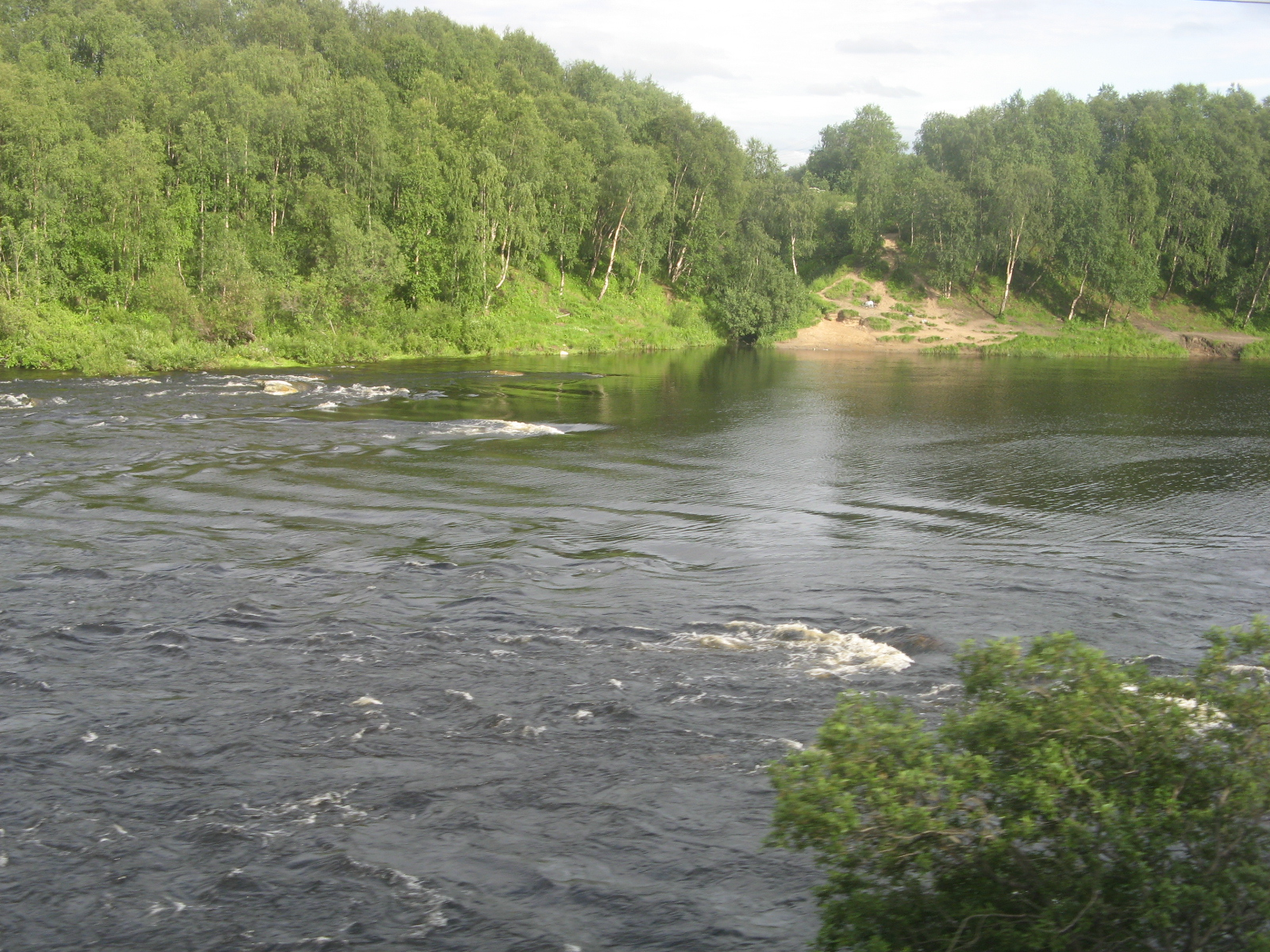 Река Кола в нижнем течении